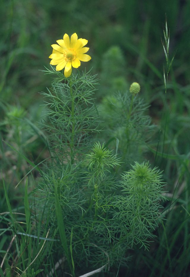 Frühlings-Adonisröschen (Adonis vernalis), Hahnenfußgewächse (Ranunculaceae) - Österreich/Austria/Autriche: Niederösterreich, Weinviertel, Steinbergwald bei Zistersdorf, Trockenrasen